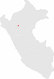 Ubicacion de la Ciudad de Moyobamba en la Republica del Perú esta imagen ha sido modificada por Juan24.